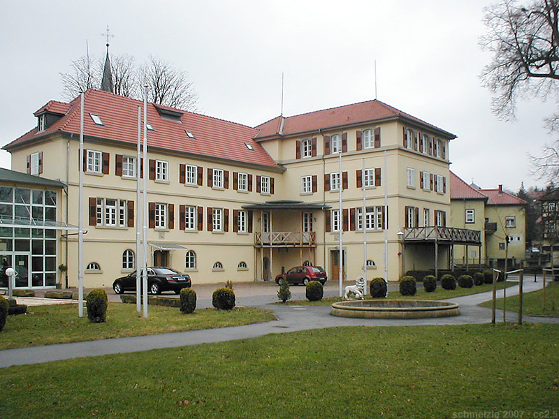 Neues Schloss in Neckarbischofsheim, erbaut im 19. Jhd. anstelle eines älteren Vorgängerbauwerks („Neues Steinhaus“).